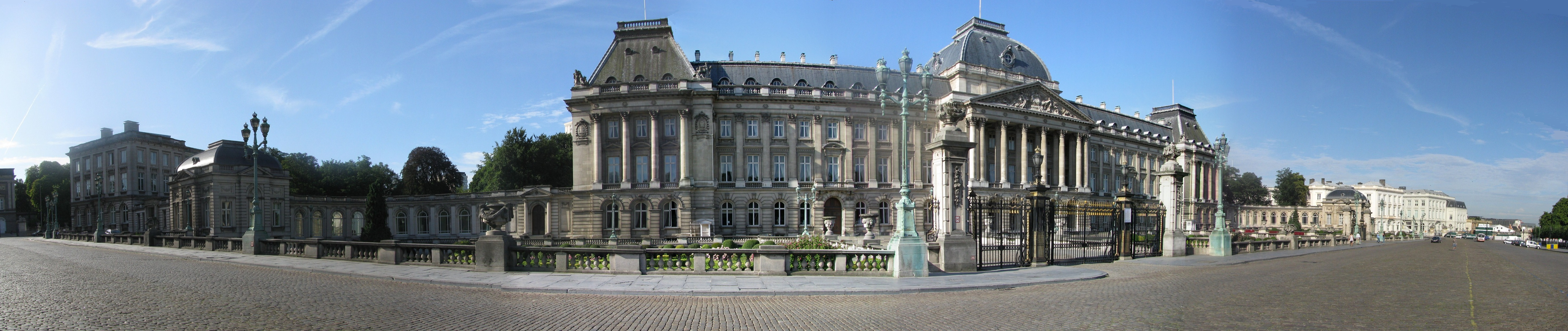 Palais Royal à Bruxelles